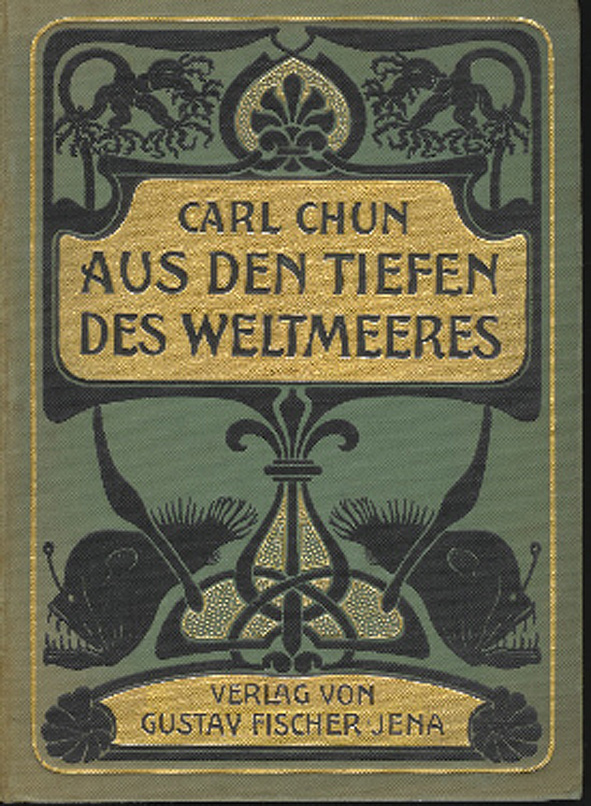 Strona tytułowa pierwszego wydania "Aus den Tiefen des Weltmeeres" (1900) Carla Chuna